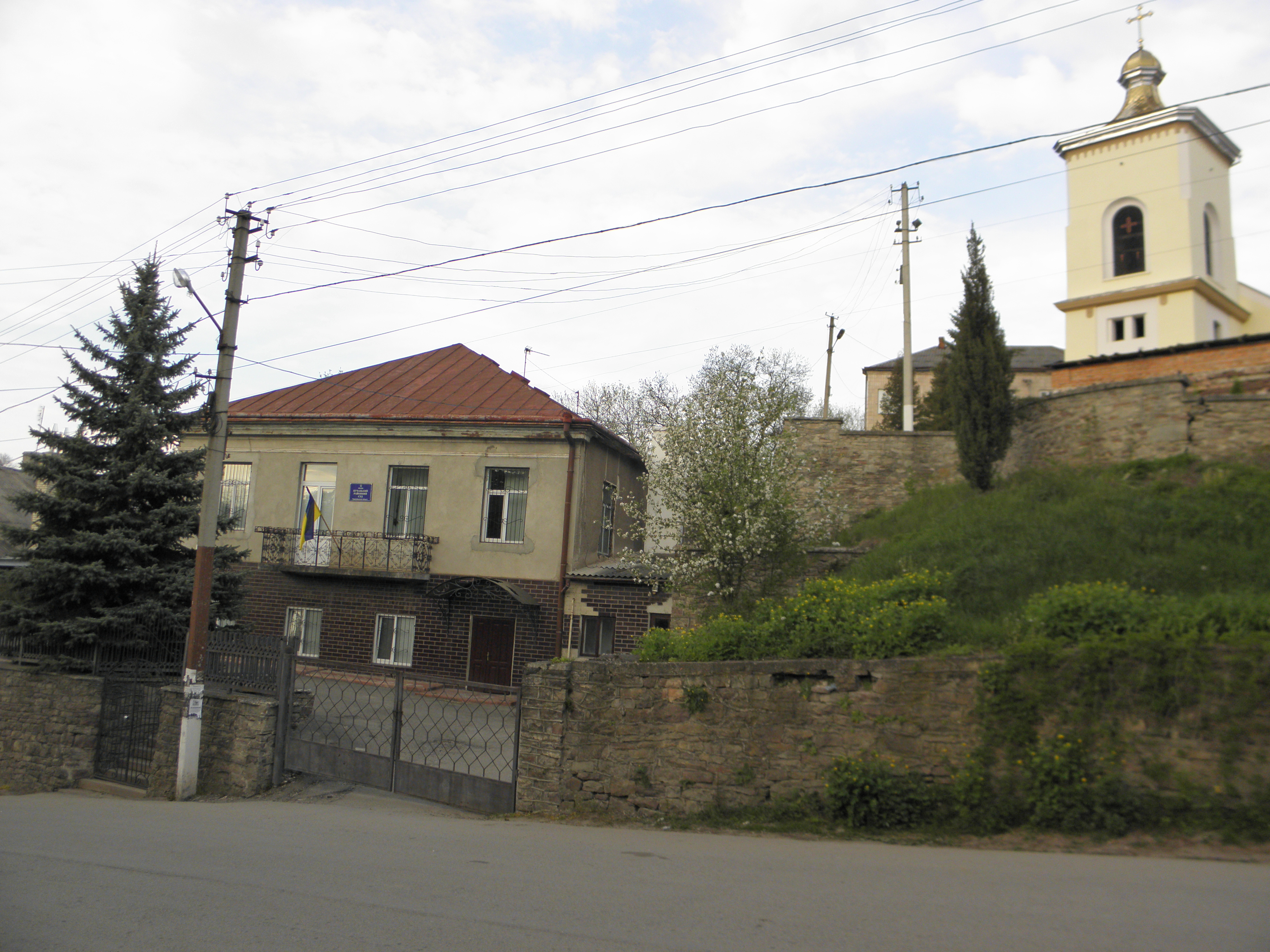 Бучач, Дзвіниця, суд